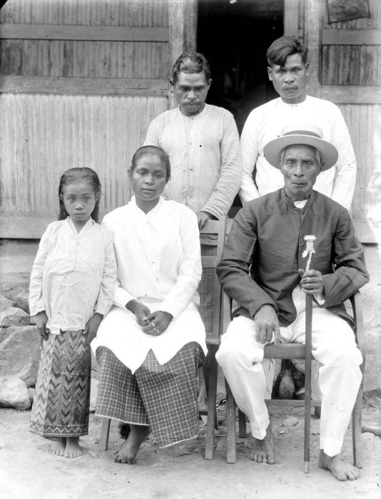 Negatief. Een oude regent met zijn familie, vermoedelijk van Boeroe